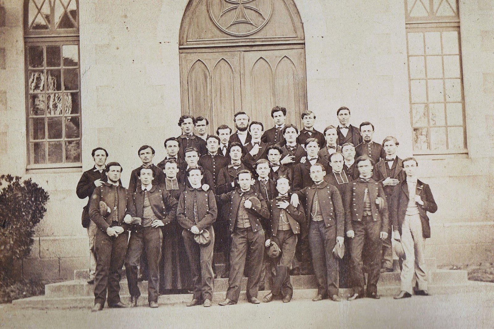 Louis Duchesne (1843-1922), en soutane au second rang à droite, à l'école Saint-Charles de Saint-Brieuc, Bretagne, France. Vers 1867-1871